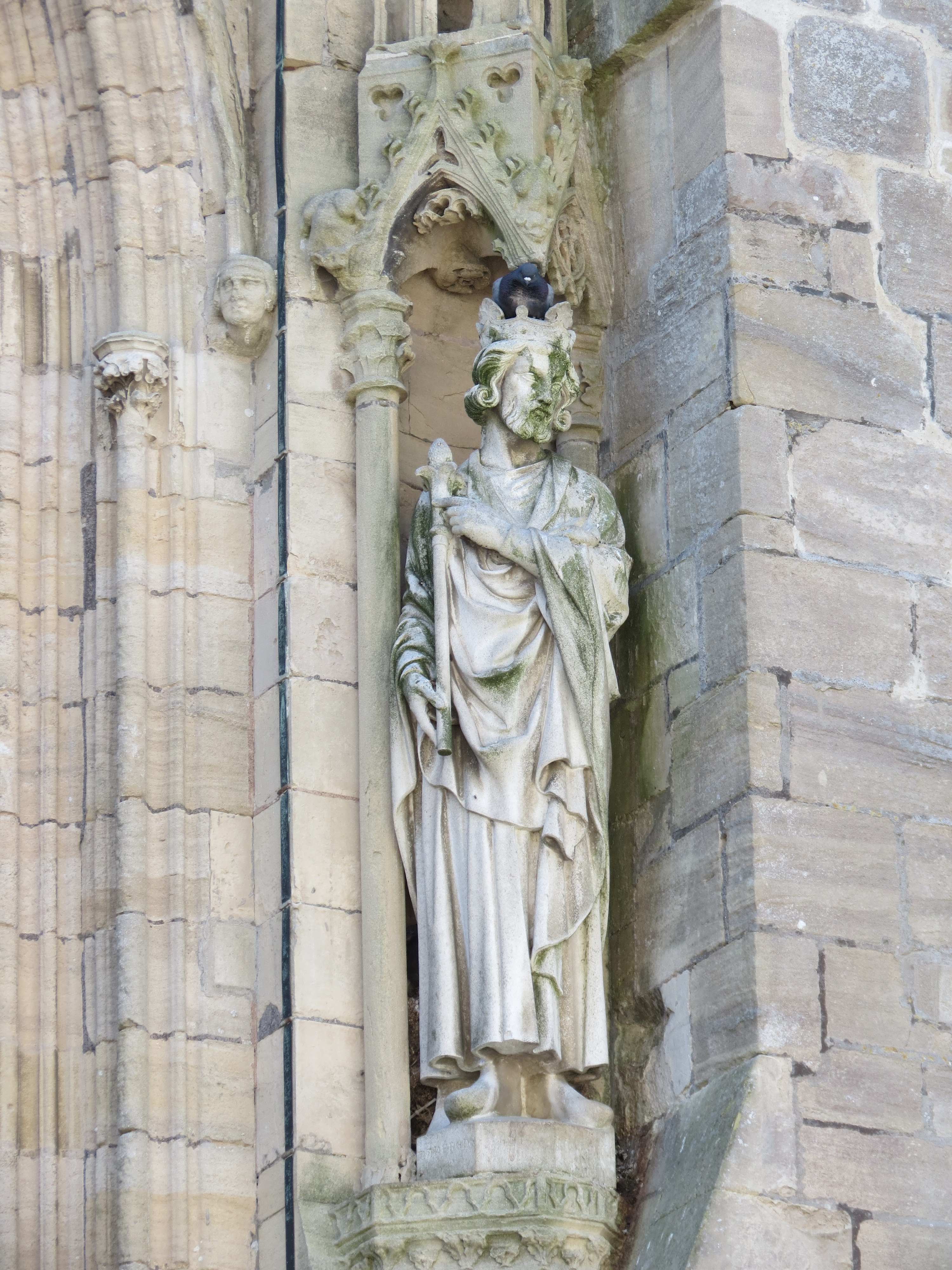 Statue de peut-être Tancrède de Hauteville datant de 1875, remplaçant celle abîmée à la Révolution.